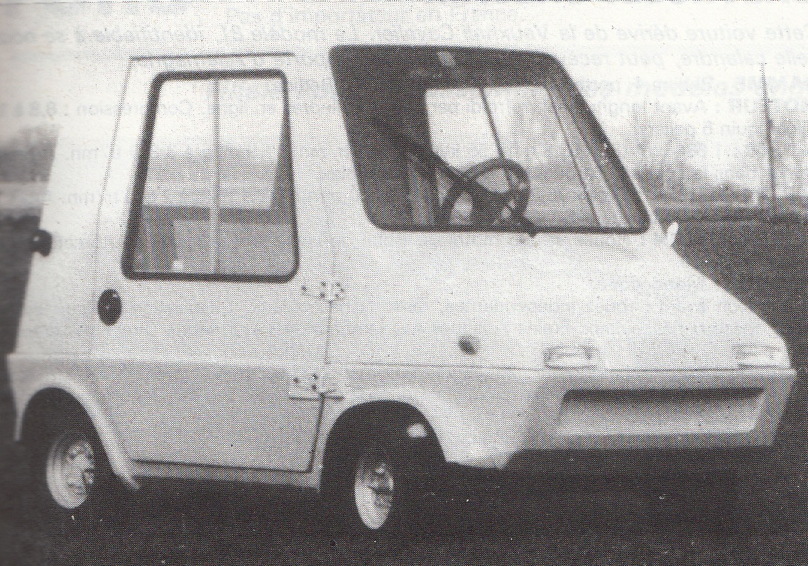 VITREX minicar